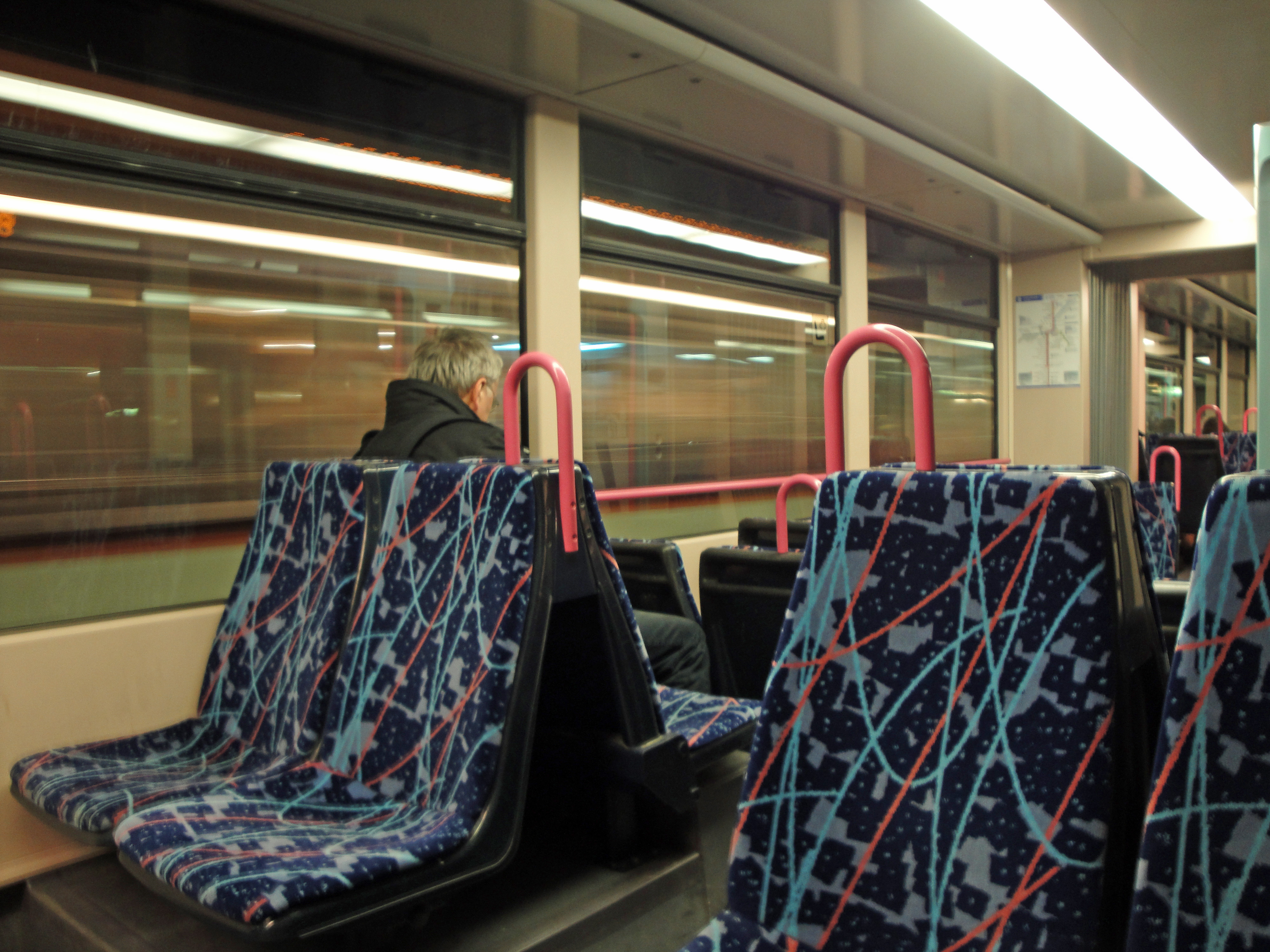 In einer Straßenbahn in Darmstadt